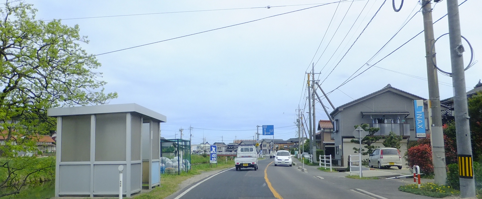 鳥取県東伯郡北栄町瀬戸 鳥取県道23号倉吉由良線